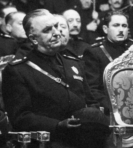 Luigi Federzoni, giornalista, accademico e gerarca del fascismo